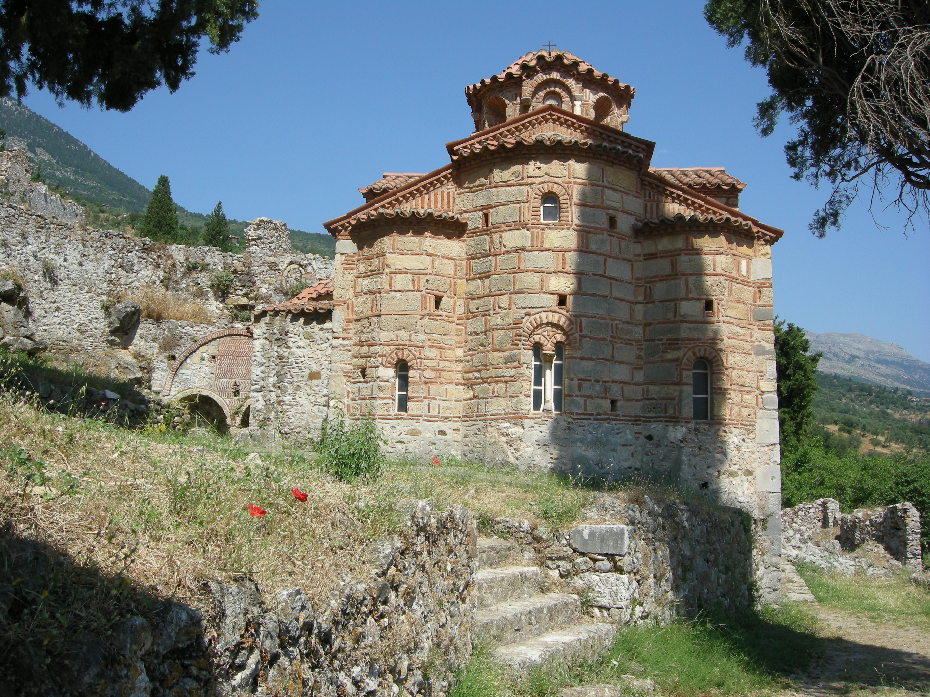 Evangelistria